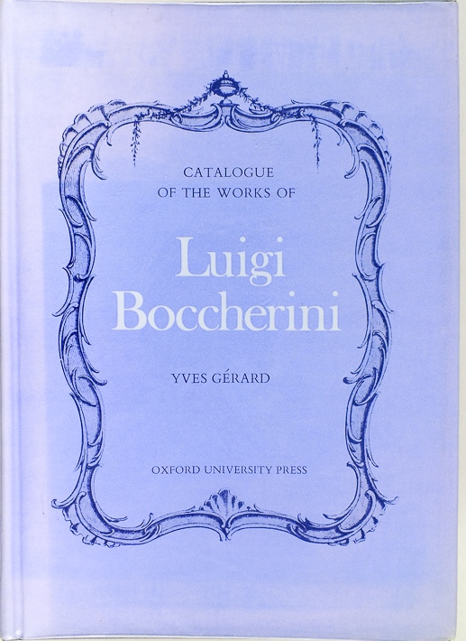 Catalogue Gérard des oeuvres de Luigi Boccherini (1969).